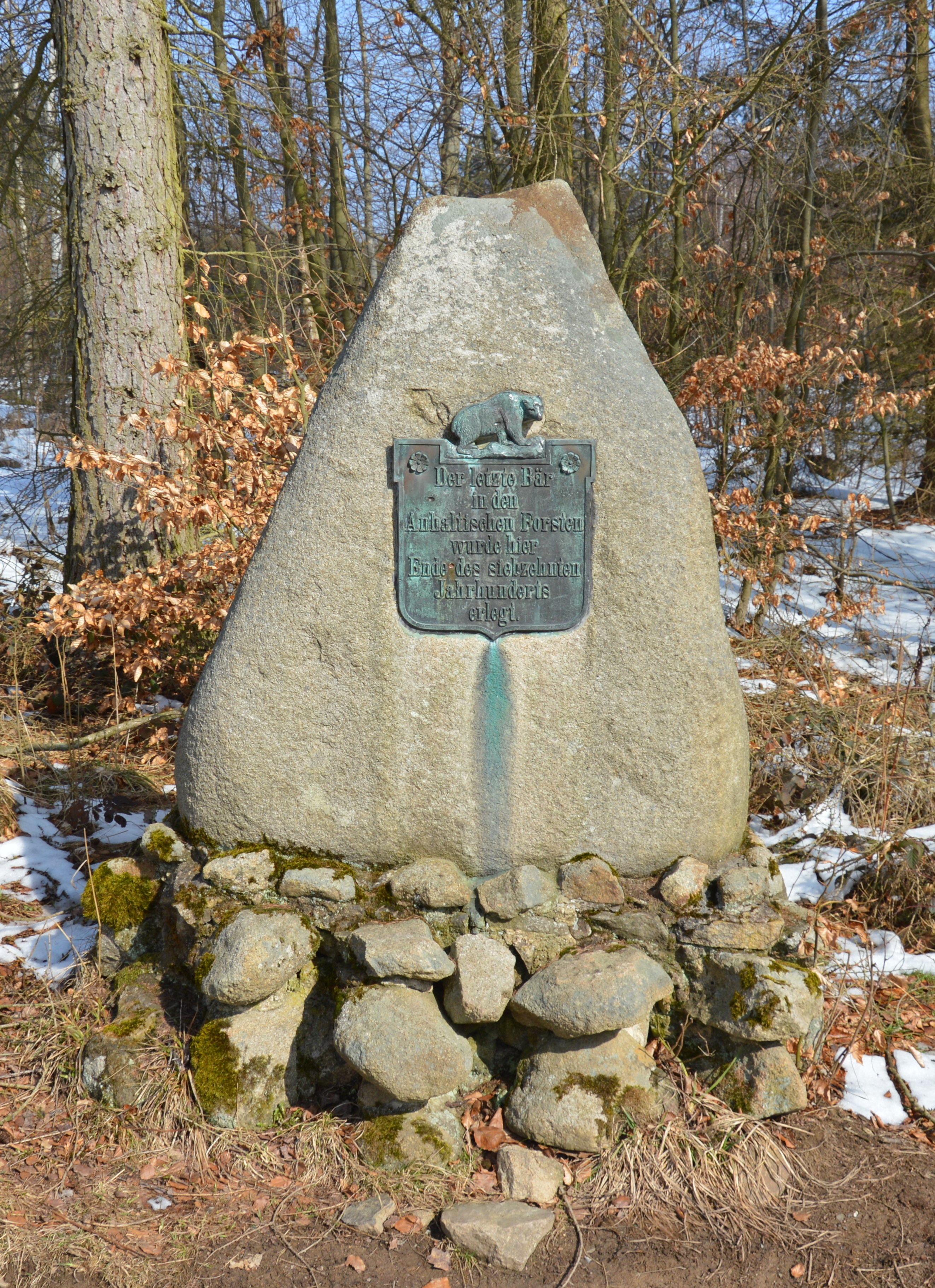 Bärendenkmal bei Gernrode